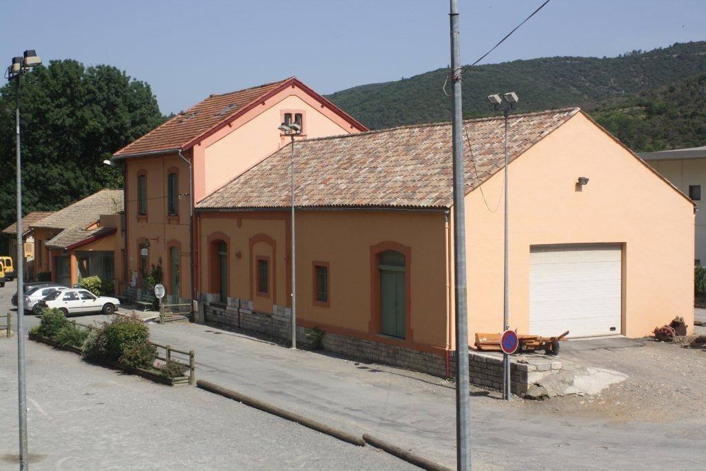 Olargues (Hérault) - ancienne gare de la ligne Bédarieux-Mazamet, aujourdhui bureau de poste.